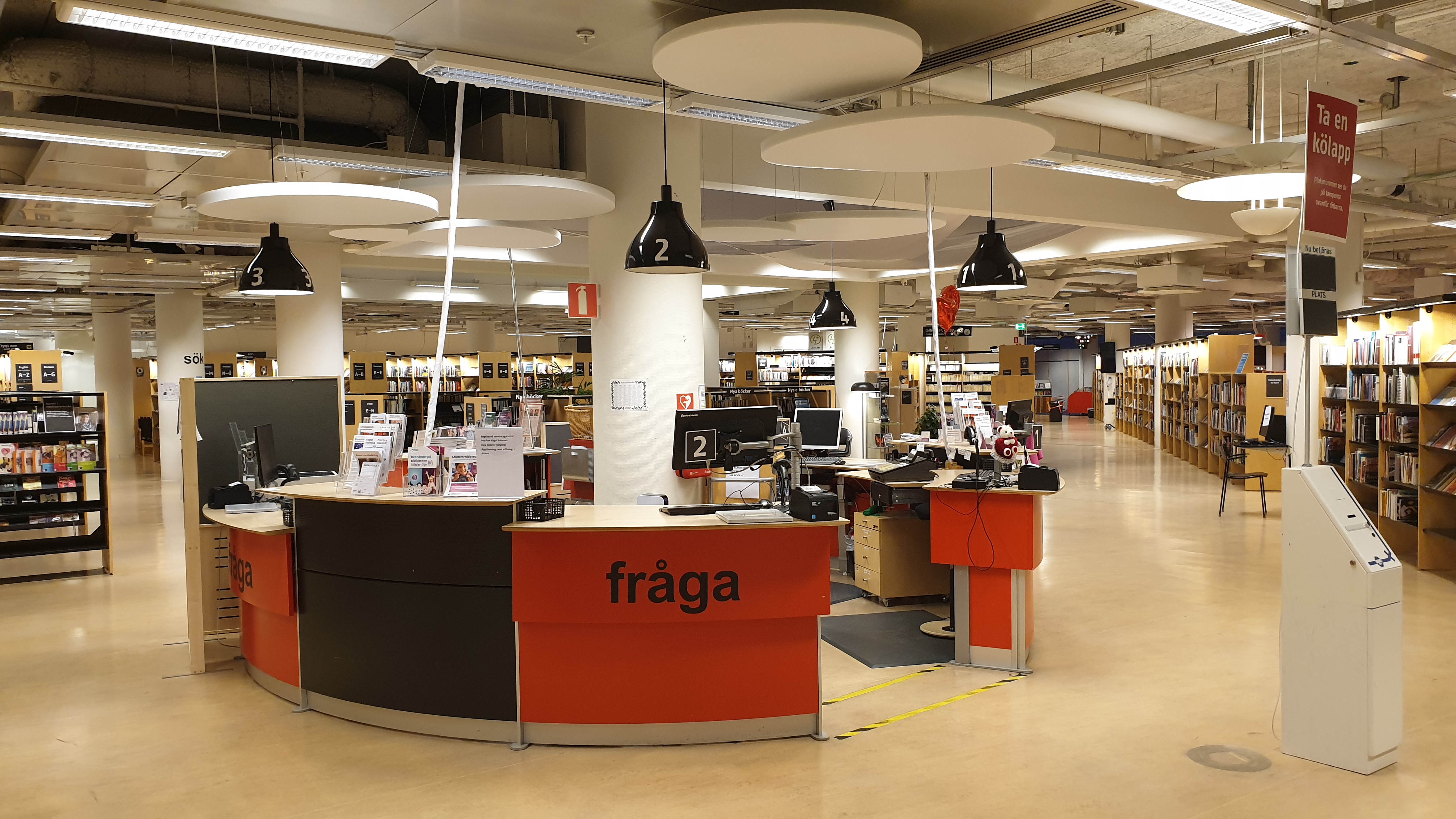 Södertälje stadsbiblioteks informationsdisk